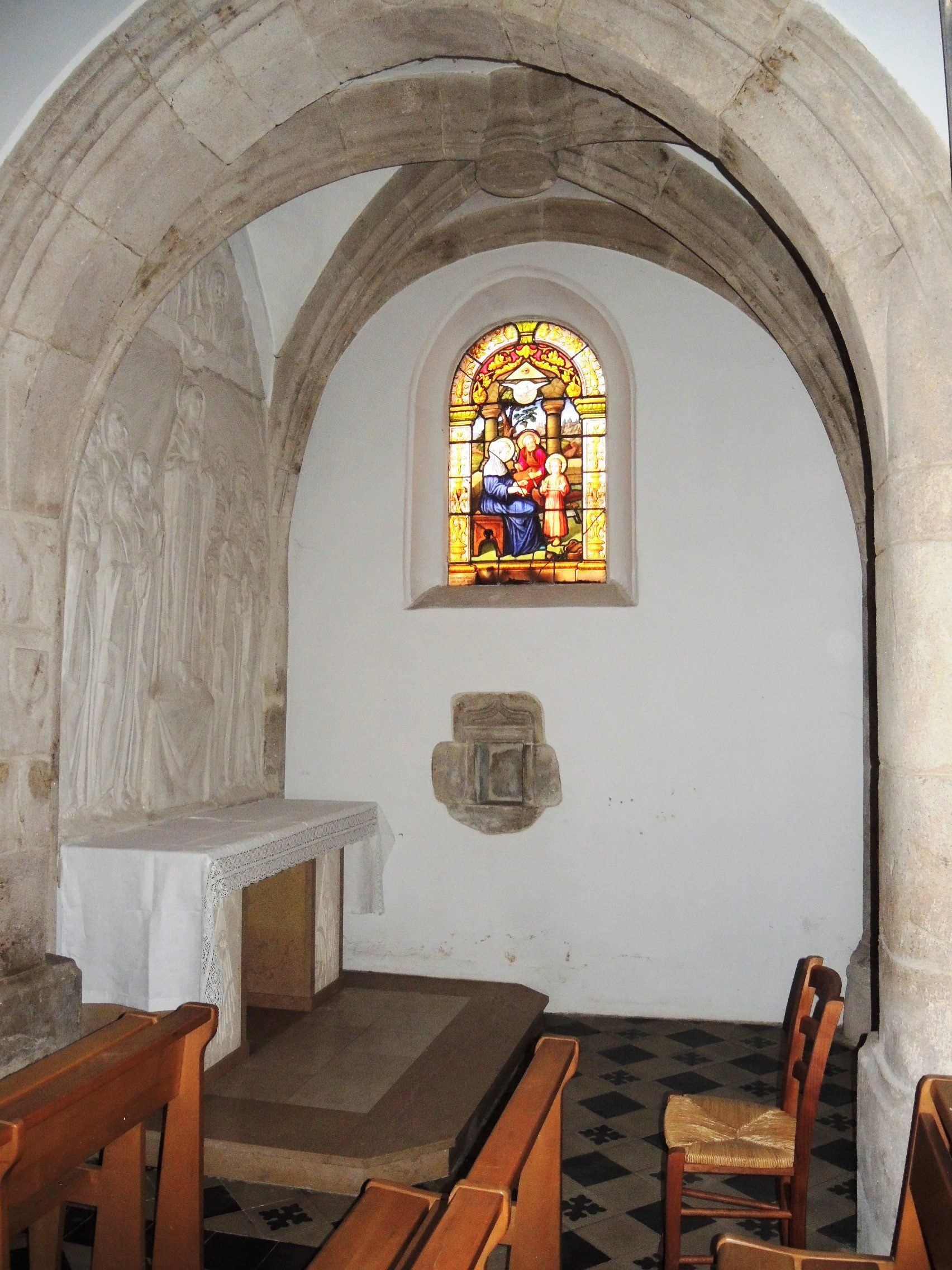 Charnas détail